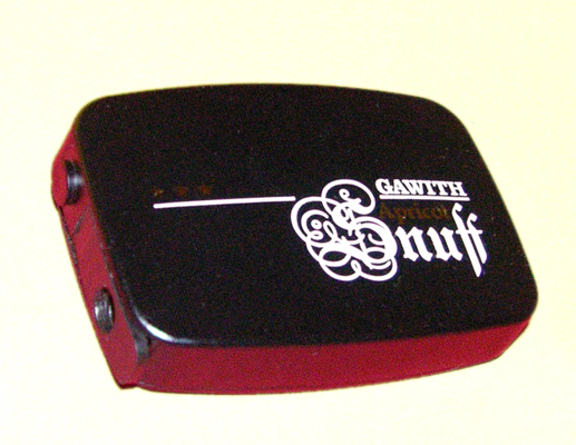 PöschlSnuff